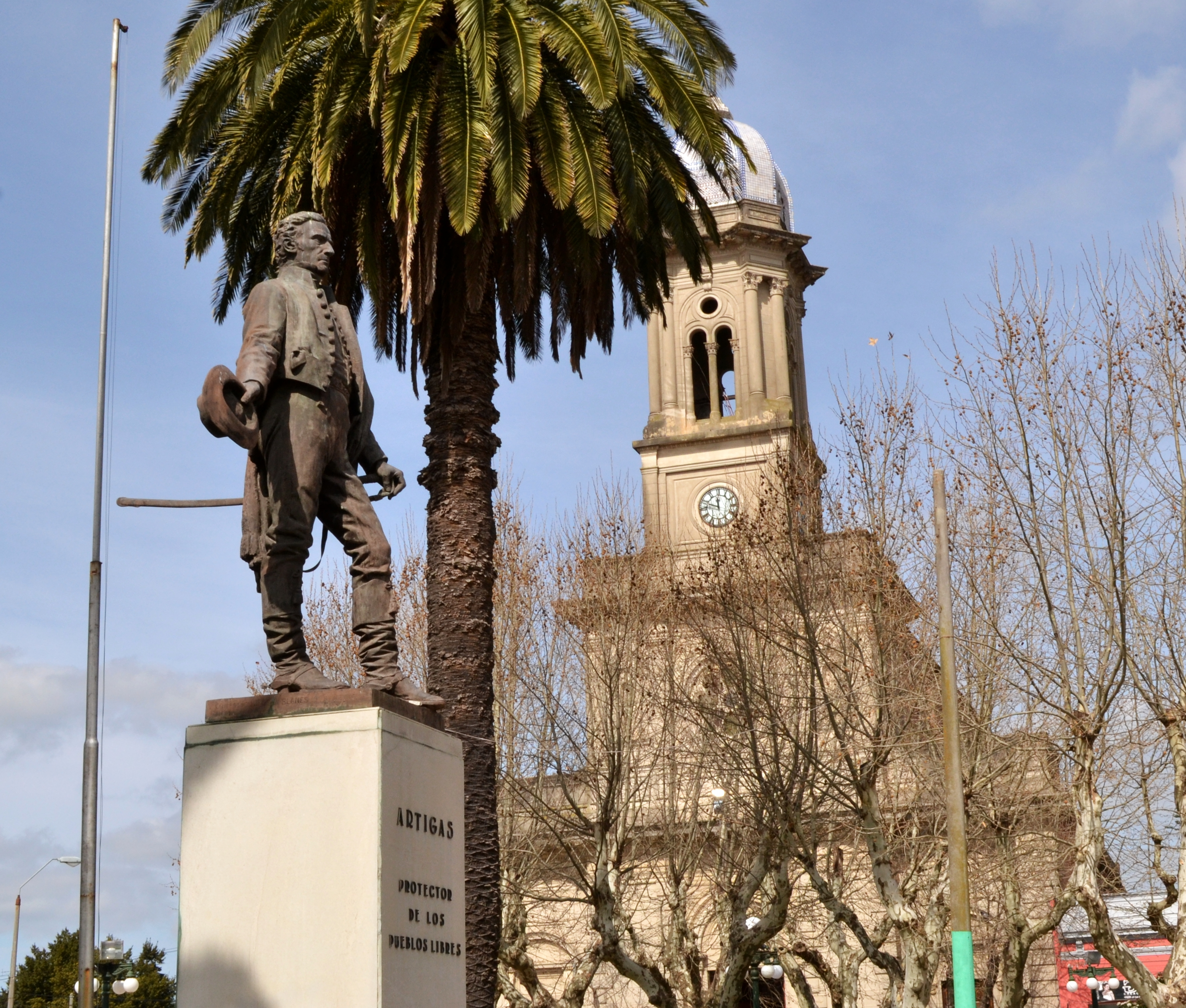 Monumento a Artigas (Rosario). Ubicada en el departamento de Colonia